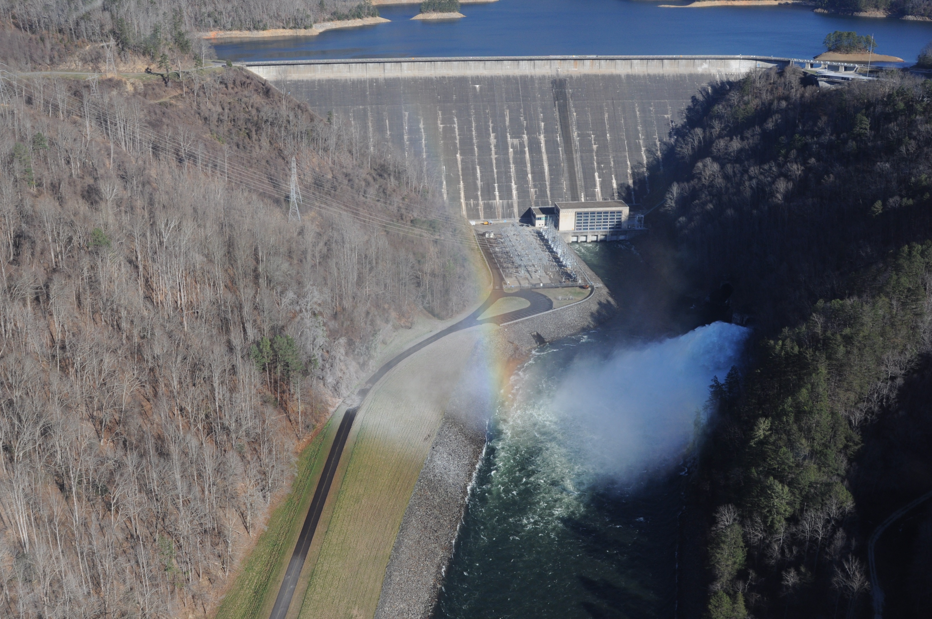 Fontana Dam